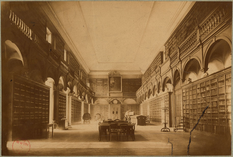 carte postale montrant l'ancienne bibliothèque du College de la Trinité à Lyon, actuel Collège-lycée Ampère.